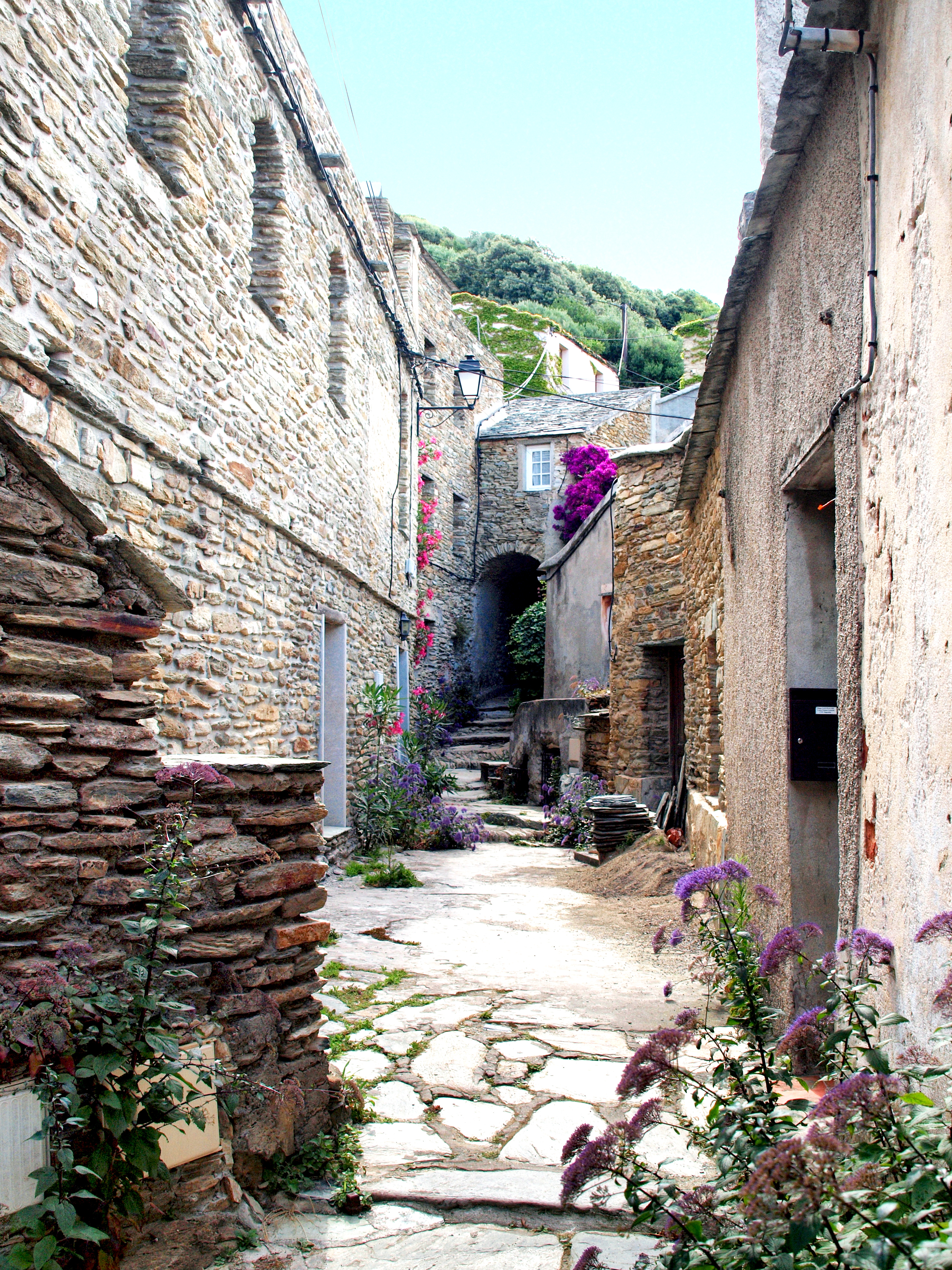 Centuri, Cap Corse (Haute-Corse) - La Via, ruelle principale du hameau médiéval de Cannelle, avec ses passages voûtés.